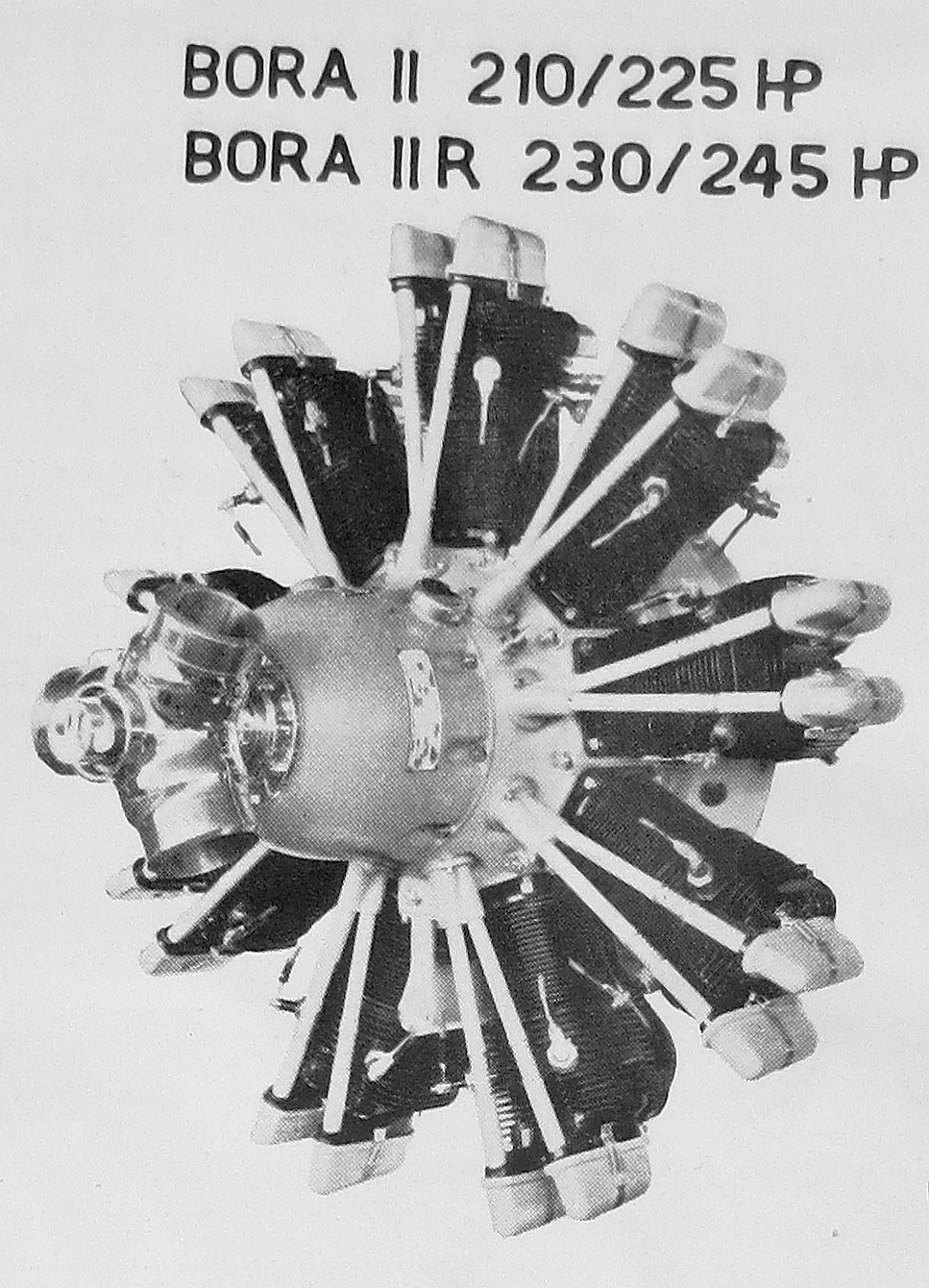 letecký motor Walter Bora II-R (1935)